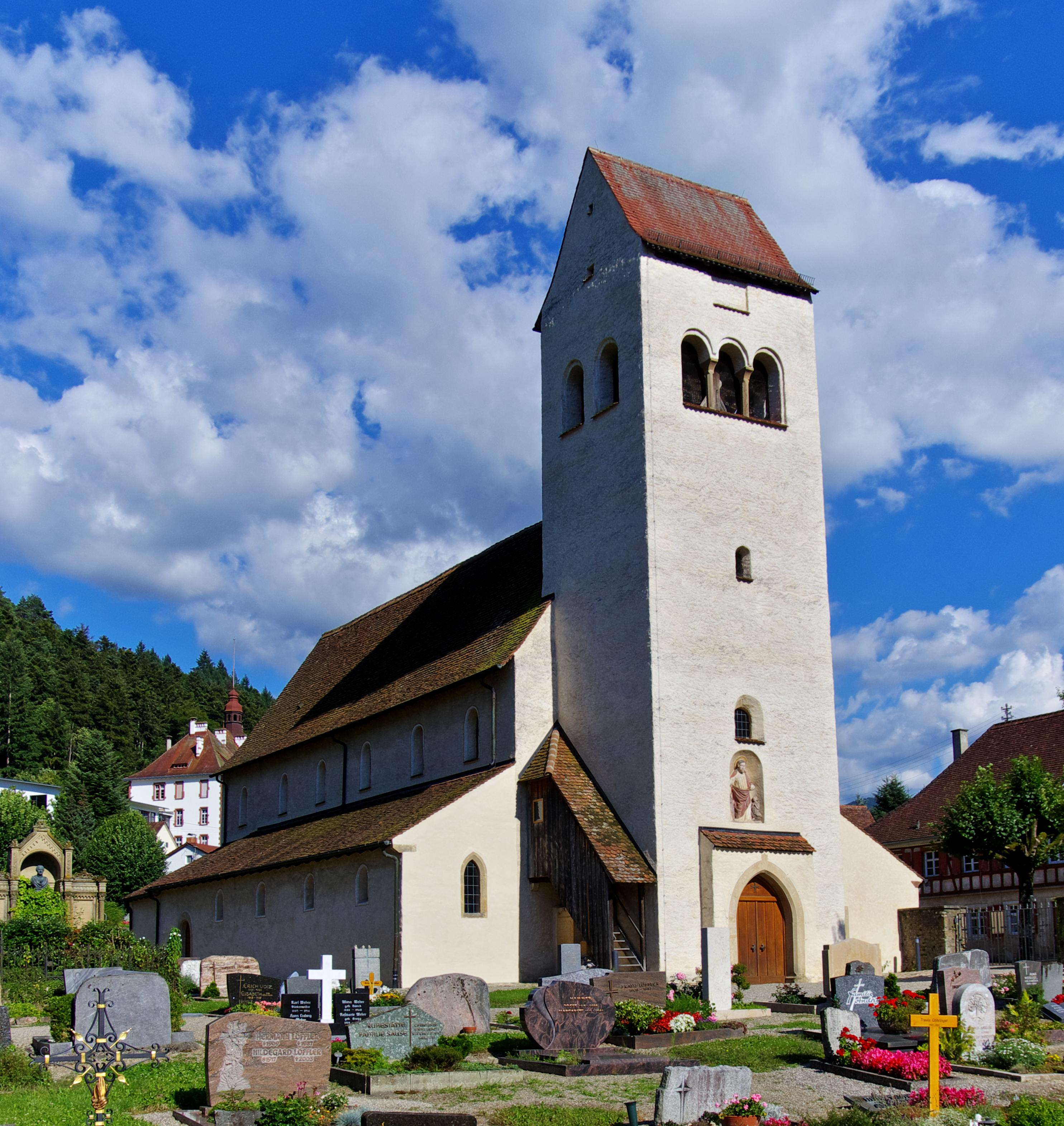 Blick auf die Kirche